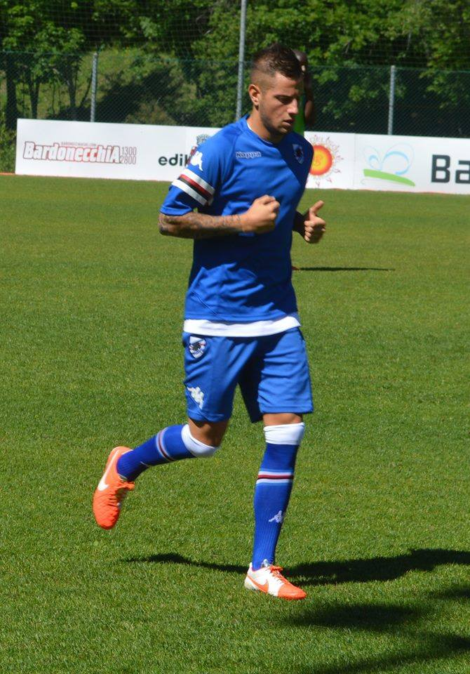 Ritiro estivo dell'U.C. Sampdoria 2014 a Bardonecchia, sessione di allenamento, 16/07/2014.